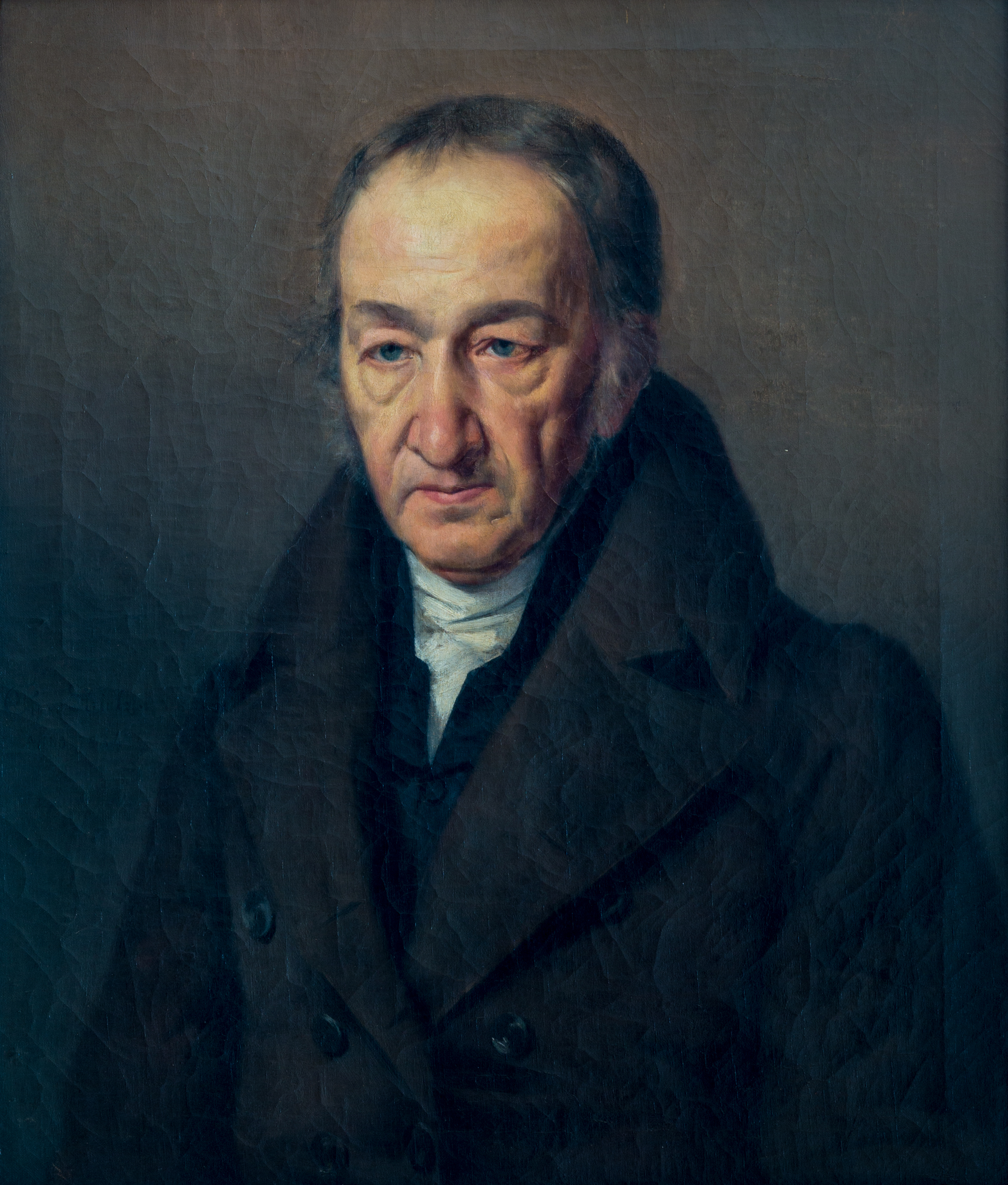 Jean Louis Herrenschneider (1760-1843), professeur à l'Université, directeur de la Bibliothèque de Strasbourg. Portrait peint à l'huile sur toile par Strintz en 1834, d'après Ch. Schmidt, Alsaciens illustres, 1864. 4e portrait. Collections du Chapitre de Saint-Thomas à Strasbourg, salle Koch